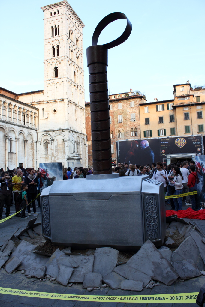 lucca_comics_13-09